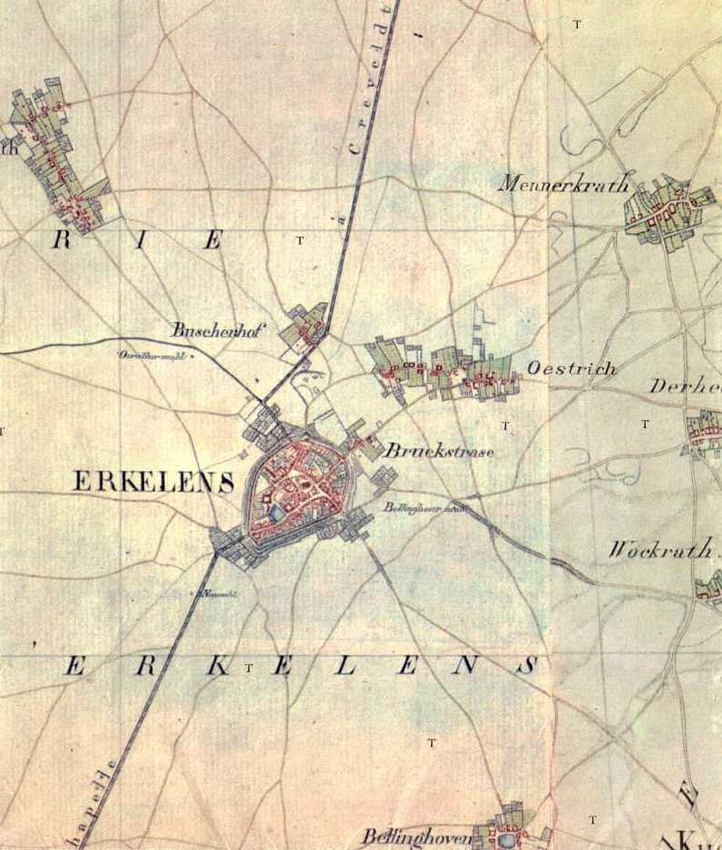 Map of Marie d`Erkelens; Kartenaufnahme des Rheinlands von Tranchot/Müffling, (Aufnahme von 1806/07)